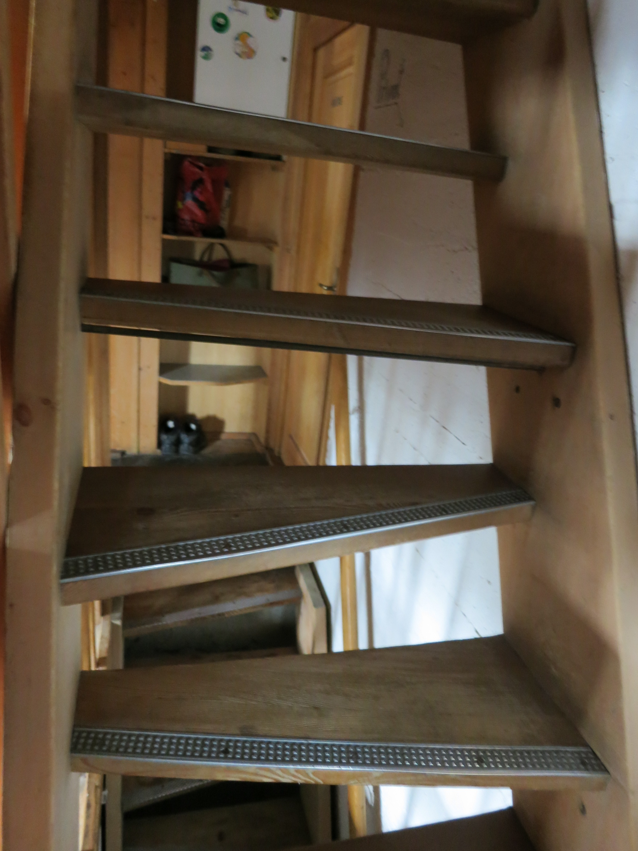 Coazhütte, Val Roseg, Samedan GR, Schweiz